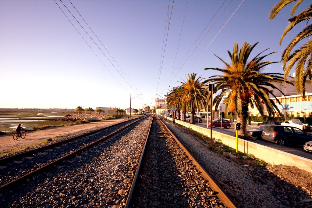 Linha do Algarve em Faro.